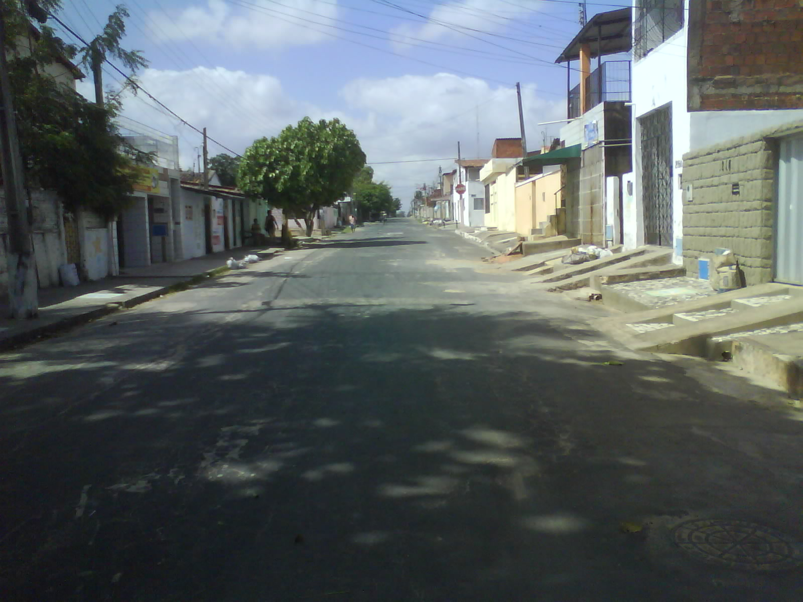 Rua Eurico Medina, uma das primeiras ruas do bairro Dom Lustosa, nas proximidades da Avenida Perimetral